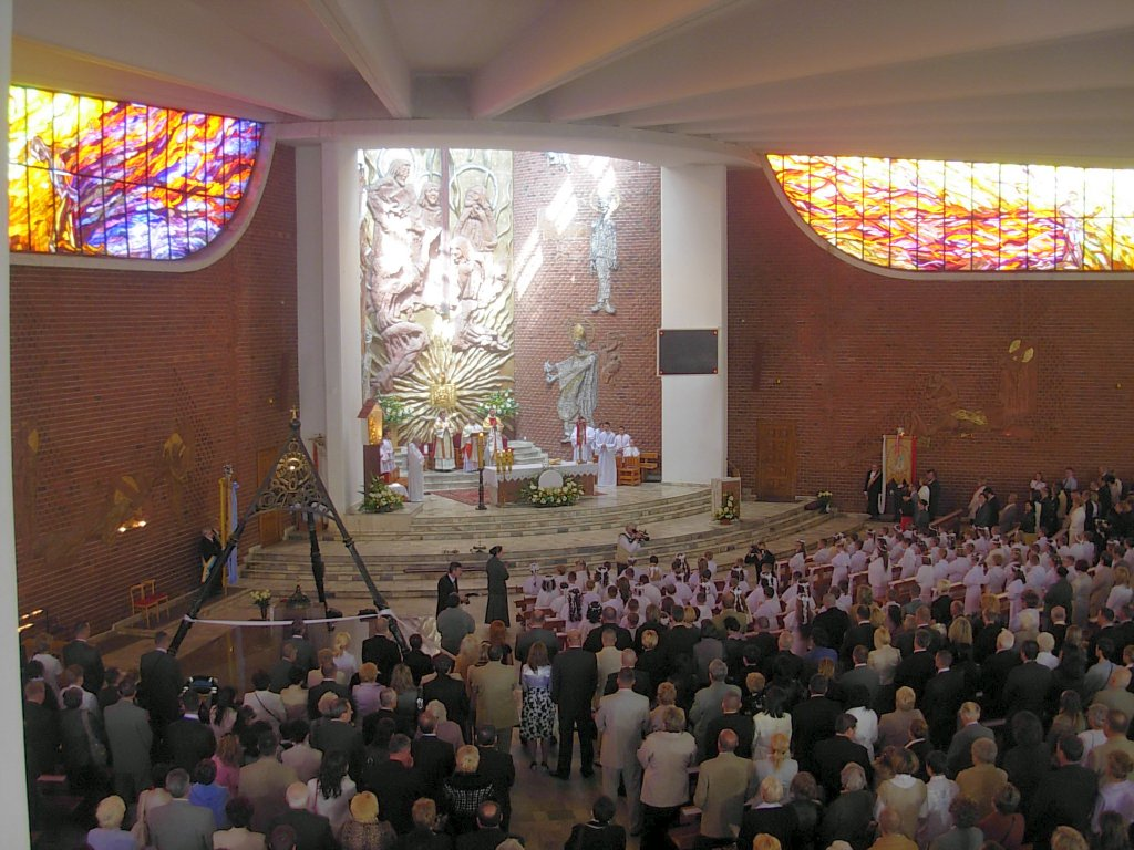 Kościół Św. Pięciu Braci Męczenników w Bydgoszczy, na Wyżynach.